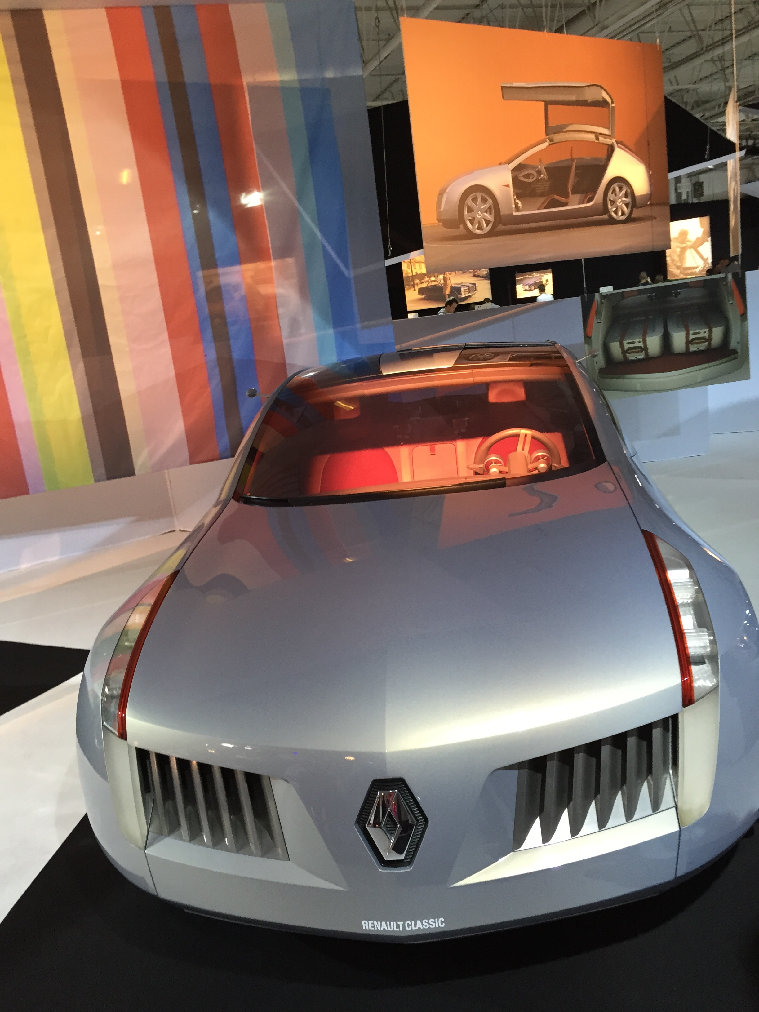 Pavillon l'Automobile et la Mode Mondial de l’Automobile de Paris 2014